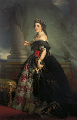 Retrato de Ángela Pérez de Barradas, duquesa de Medinaceli